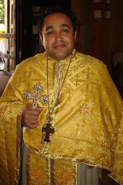 фото священика, композитора, поета отця Валерія Сиротюка